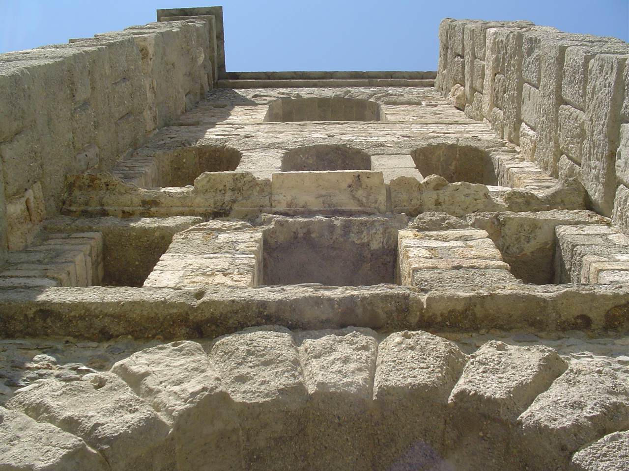 Teatro romano di Aosta This is a photo of a monument which is part of cultural heritage of Italy.